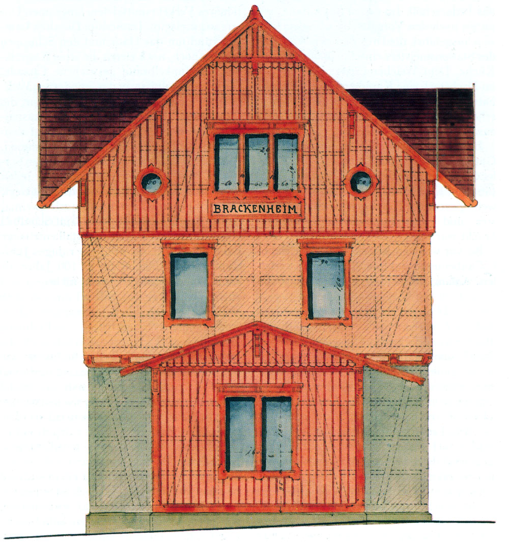 Bahnhof Brackenheim, Empfangsgebäude, Seitenansicht